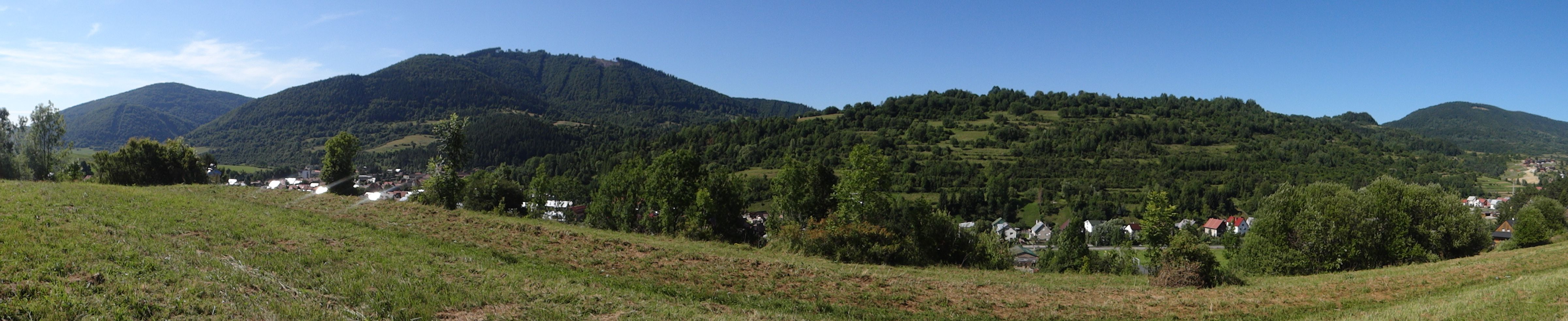 Kysucká vrchovina, Terchová